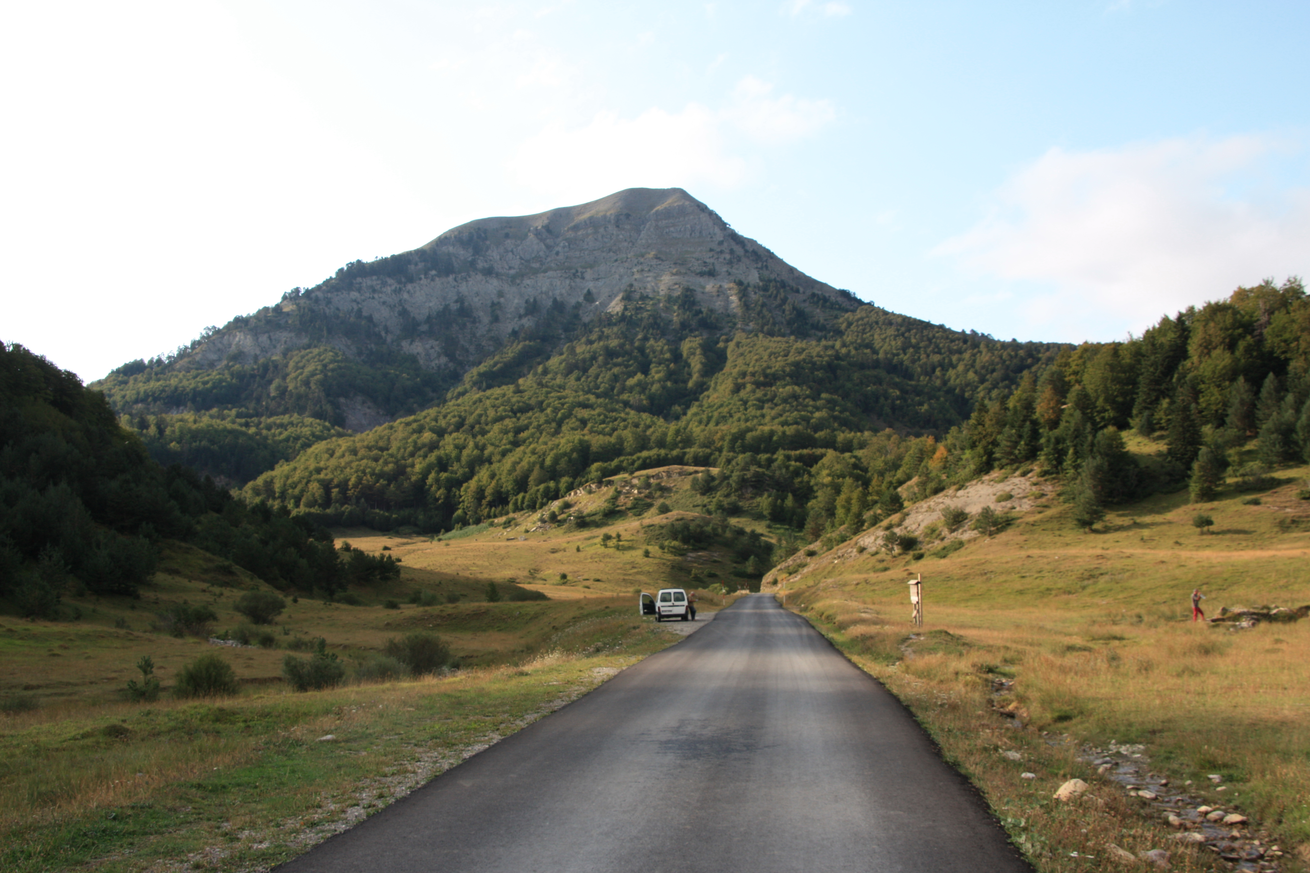 Txamantxoiaren ikuspegia Linzako aterpera dijoan bidetik ikusia.